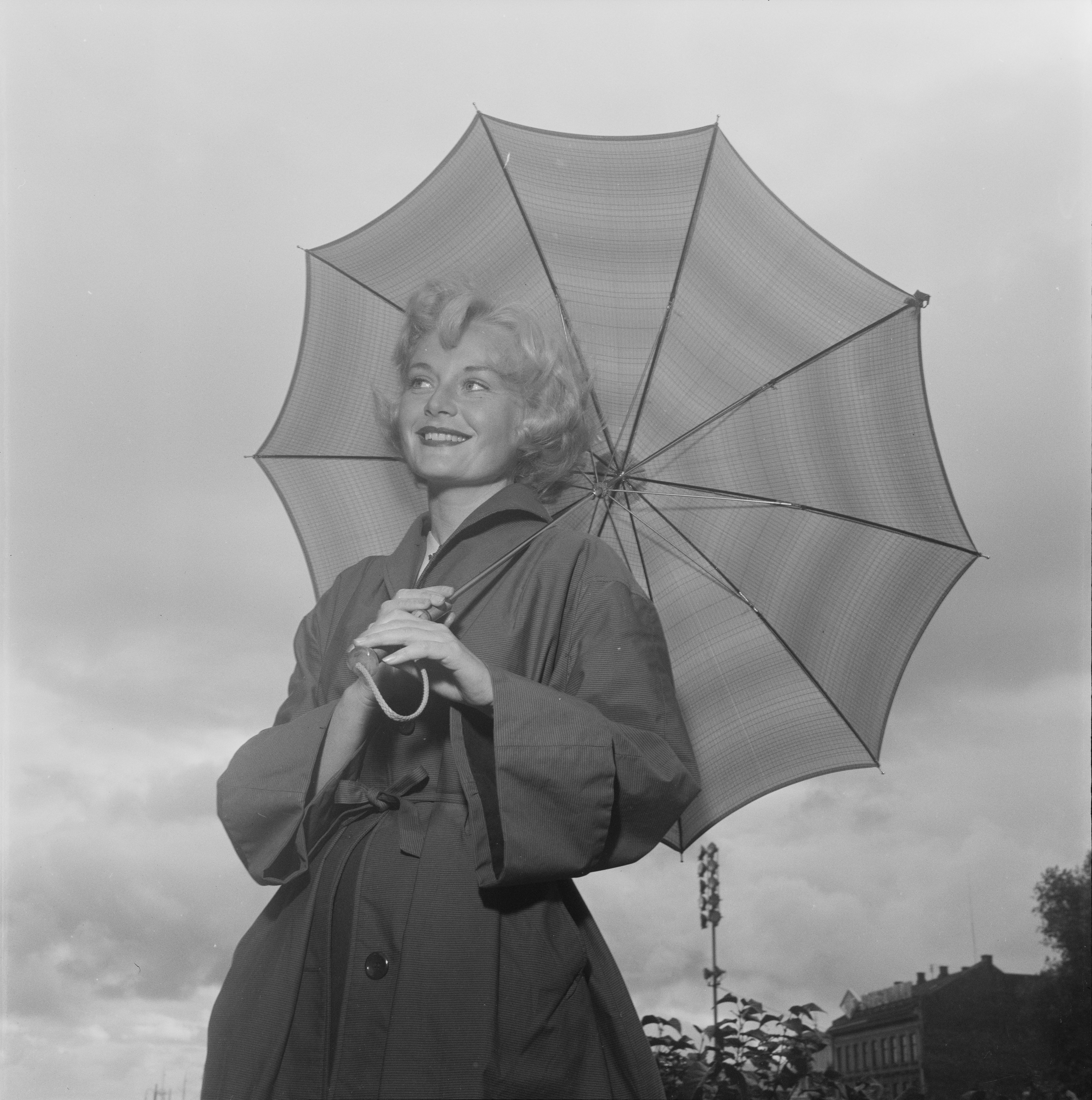 Bildet er hentet fra Arkivverket. Randi Kolstad. NÅ nr. 17, 1954. Arkivinstitusjon : Riksarkivet Arkivnavn : Billedbladet NÅ Sted : Norge, Ukjent, Ukjent, Ukjent Emneord: Skuespillere, Skuespillerinner Avbildet